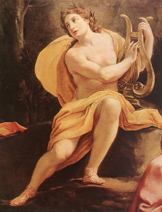 detail